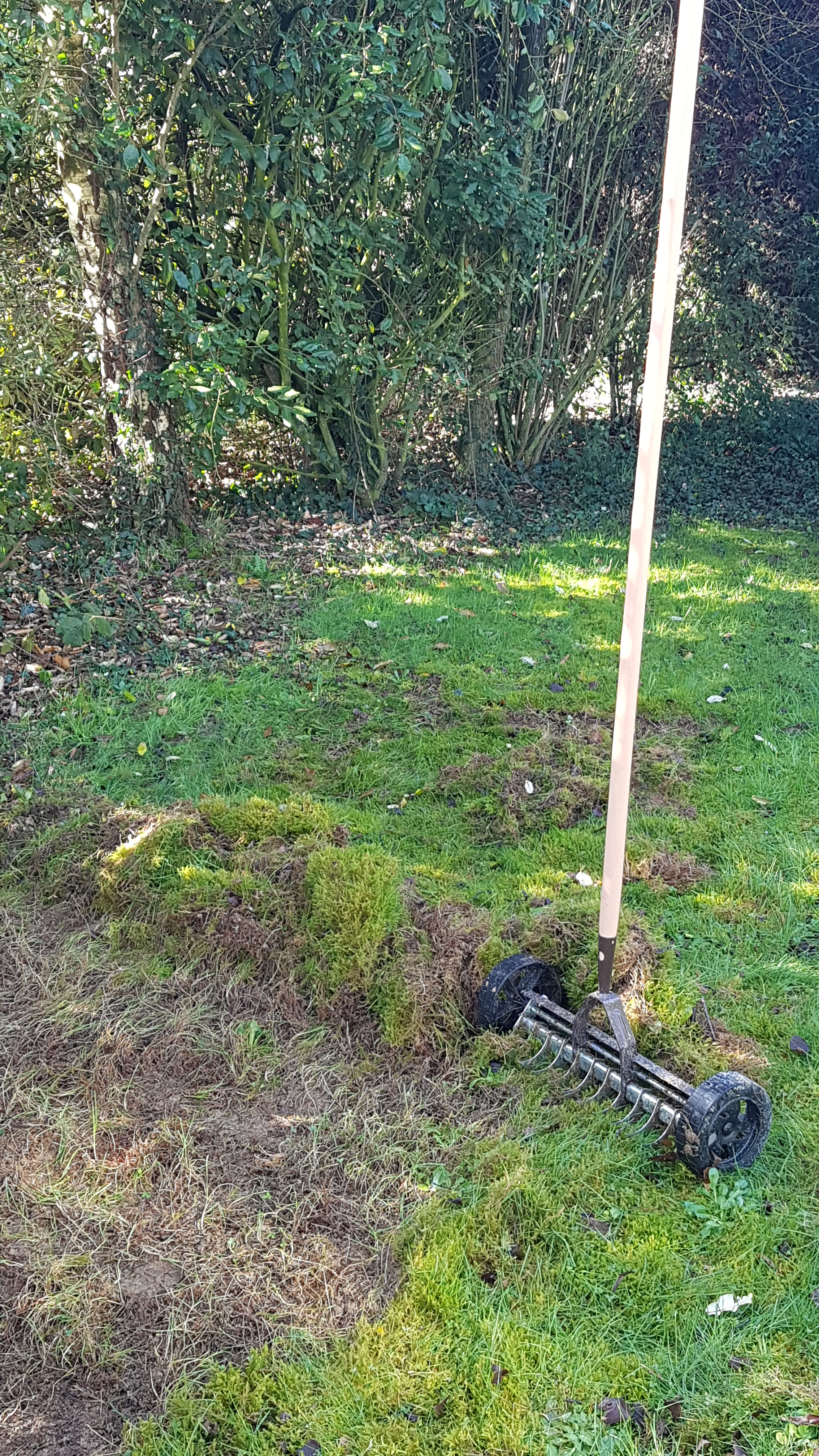 Scarificateur manuel et élimination de mousse